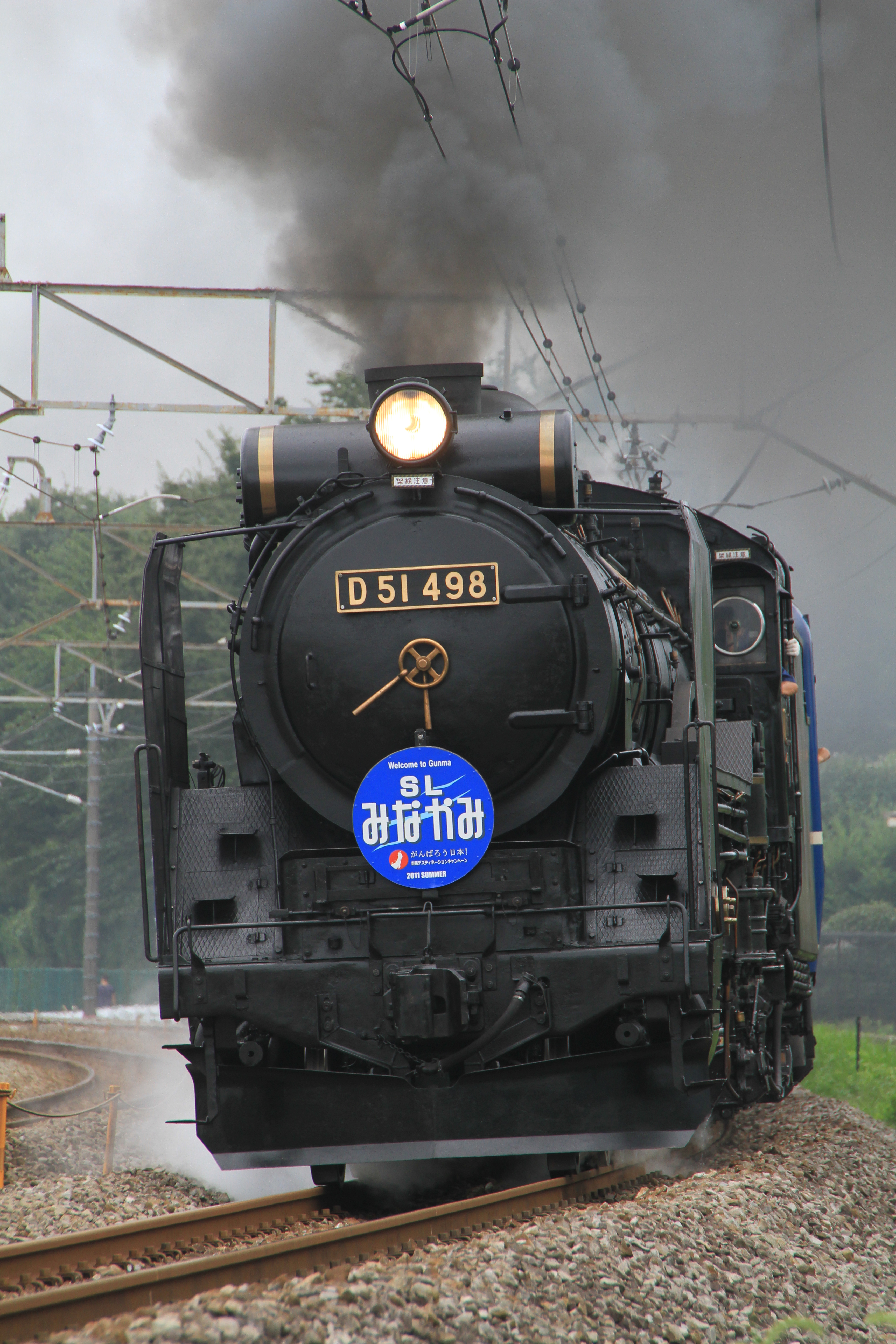 SLみなかみ1号